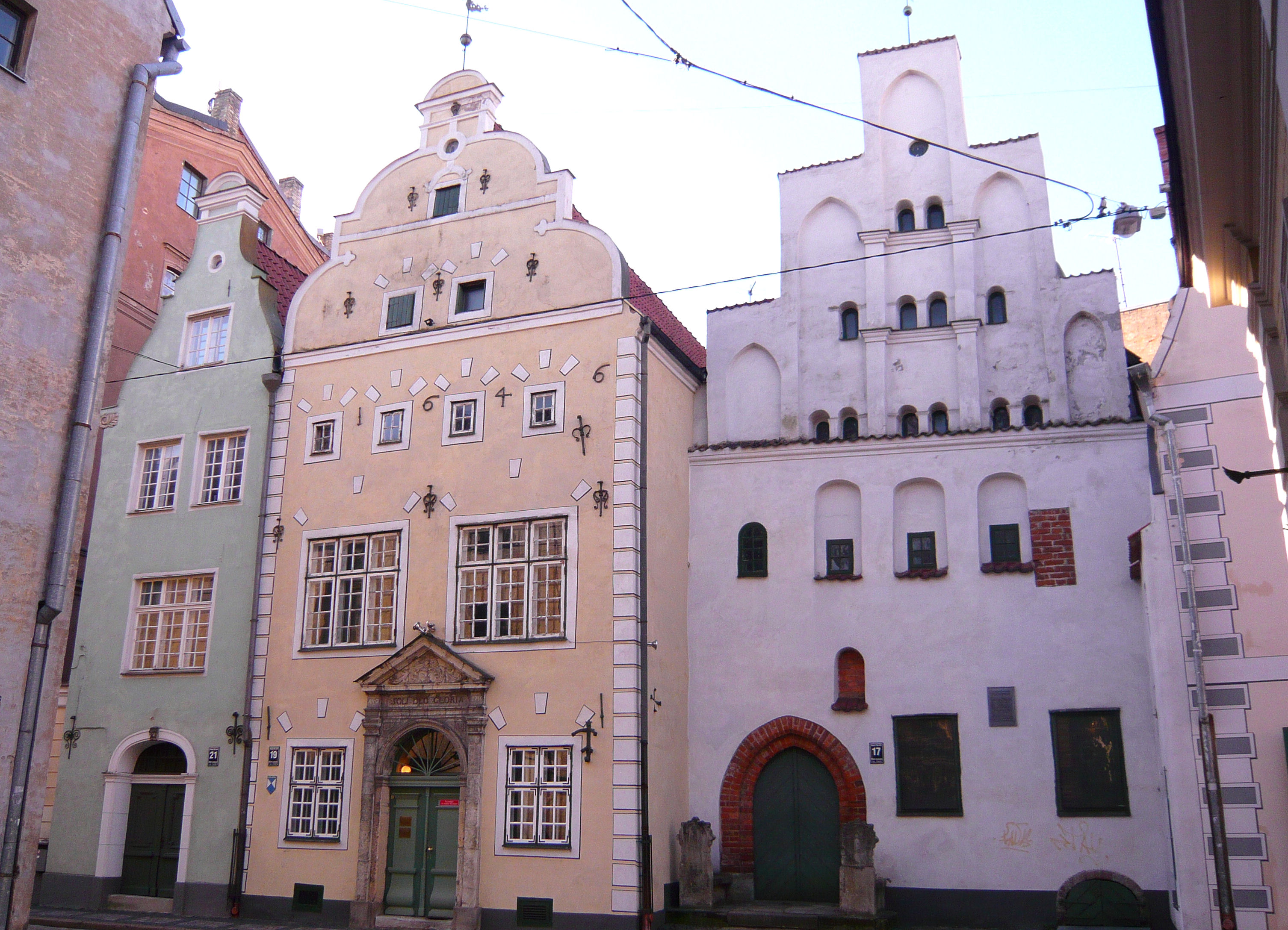 Trzech Braci - kompleks średniowiecznych budynków w Rydze